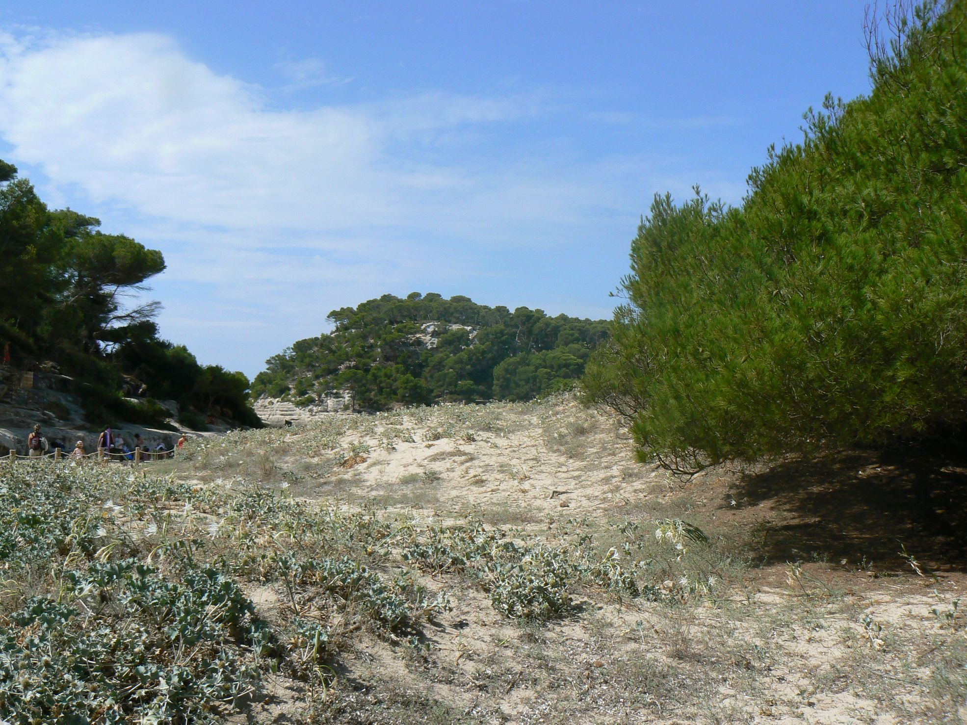 Accès a peu, des de l'aparcament, a la Cala Mitjana de Menorca. En primer pla, pins i dunes amb cards marins. Foto presa en agost.